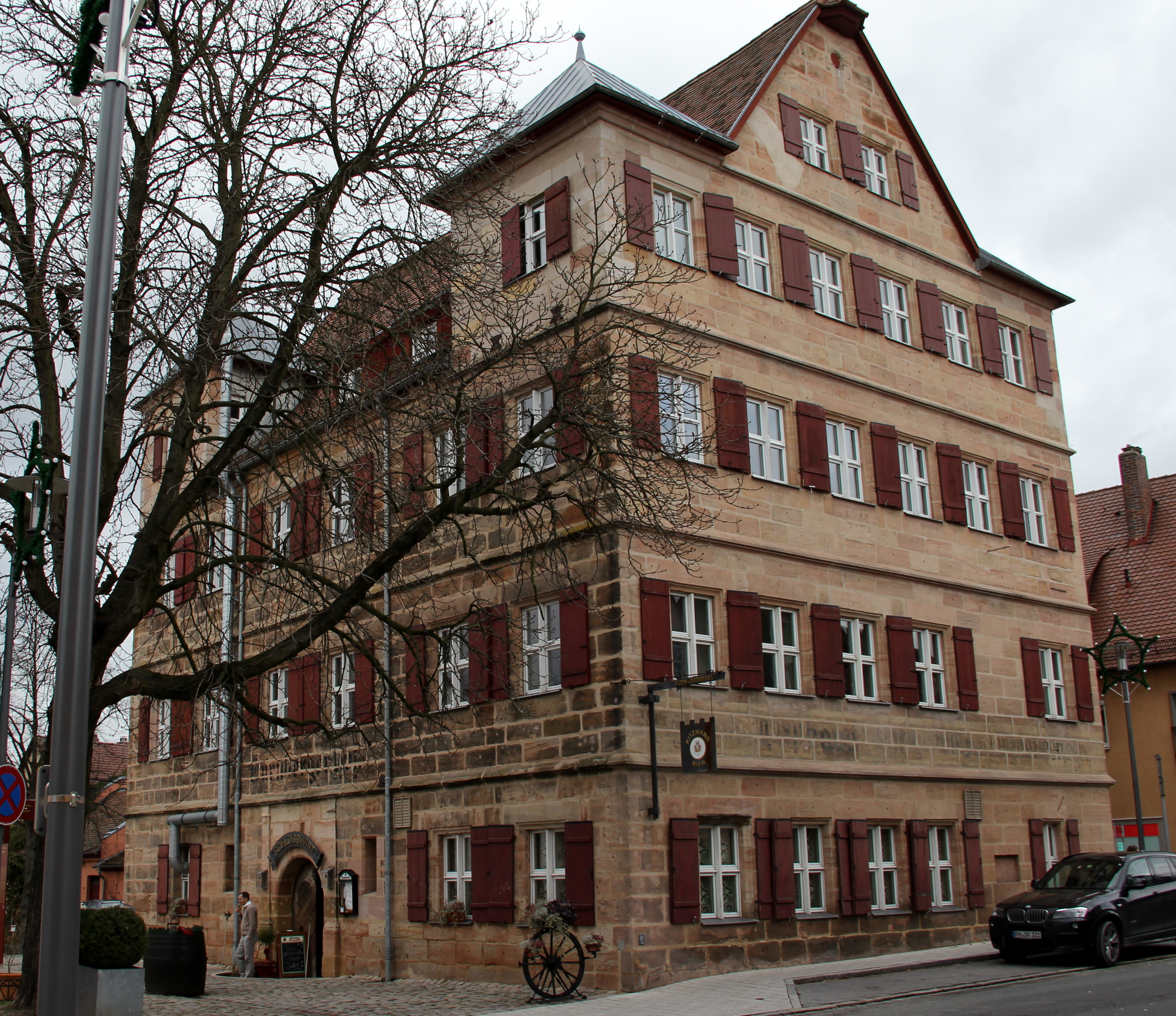 Tucherschloss, Blickrichtung Südost nach Nordwest